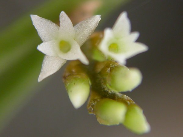 Campylocentrum ornithorrhynchum - São Paulo